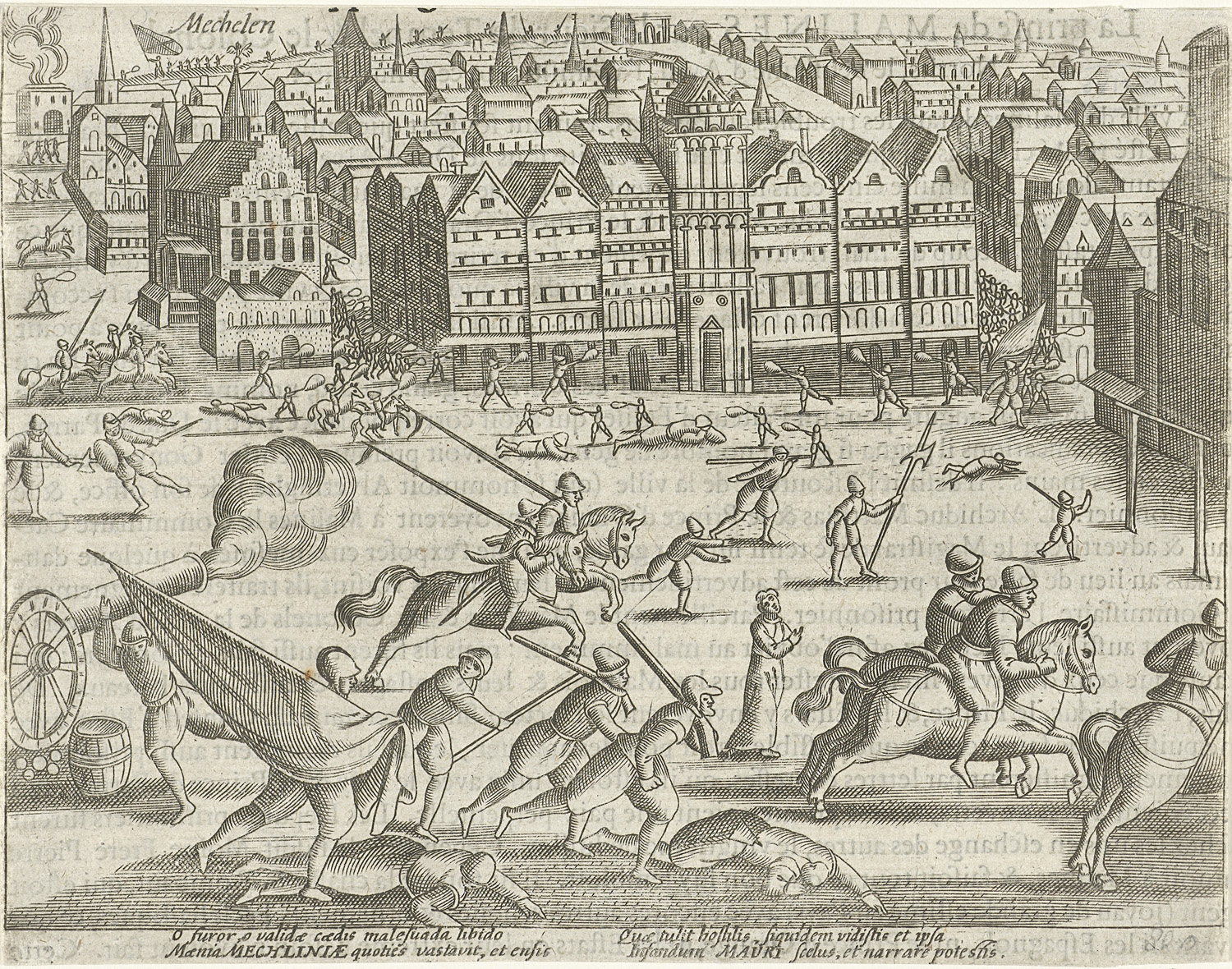 Verovering van Mechelen, 1580